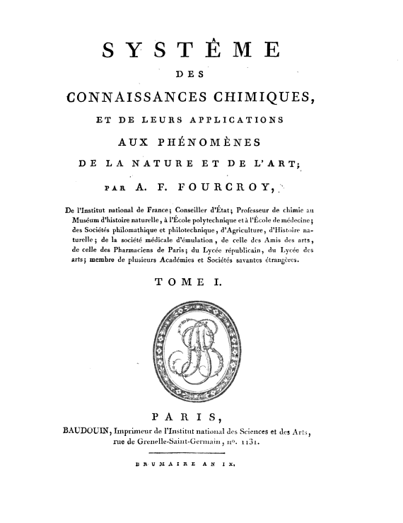 page de titre de "Système des connaissances chimiques et de leurs applications aux phénomènes de la nature et de l'art", par Antoine François de Fourcroy, publié en Brumaine, an IX (1801)